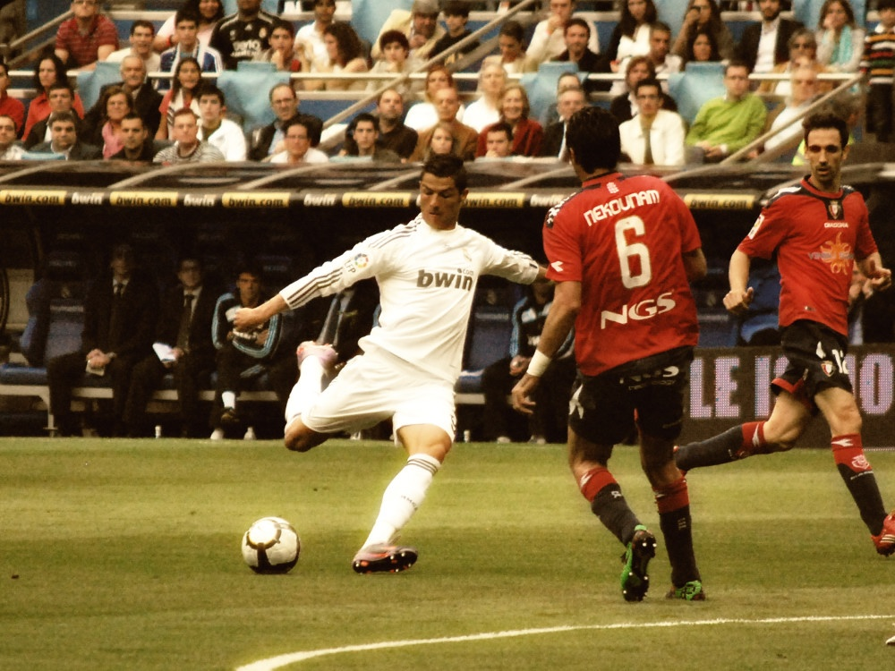 madrid-osasuna_004